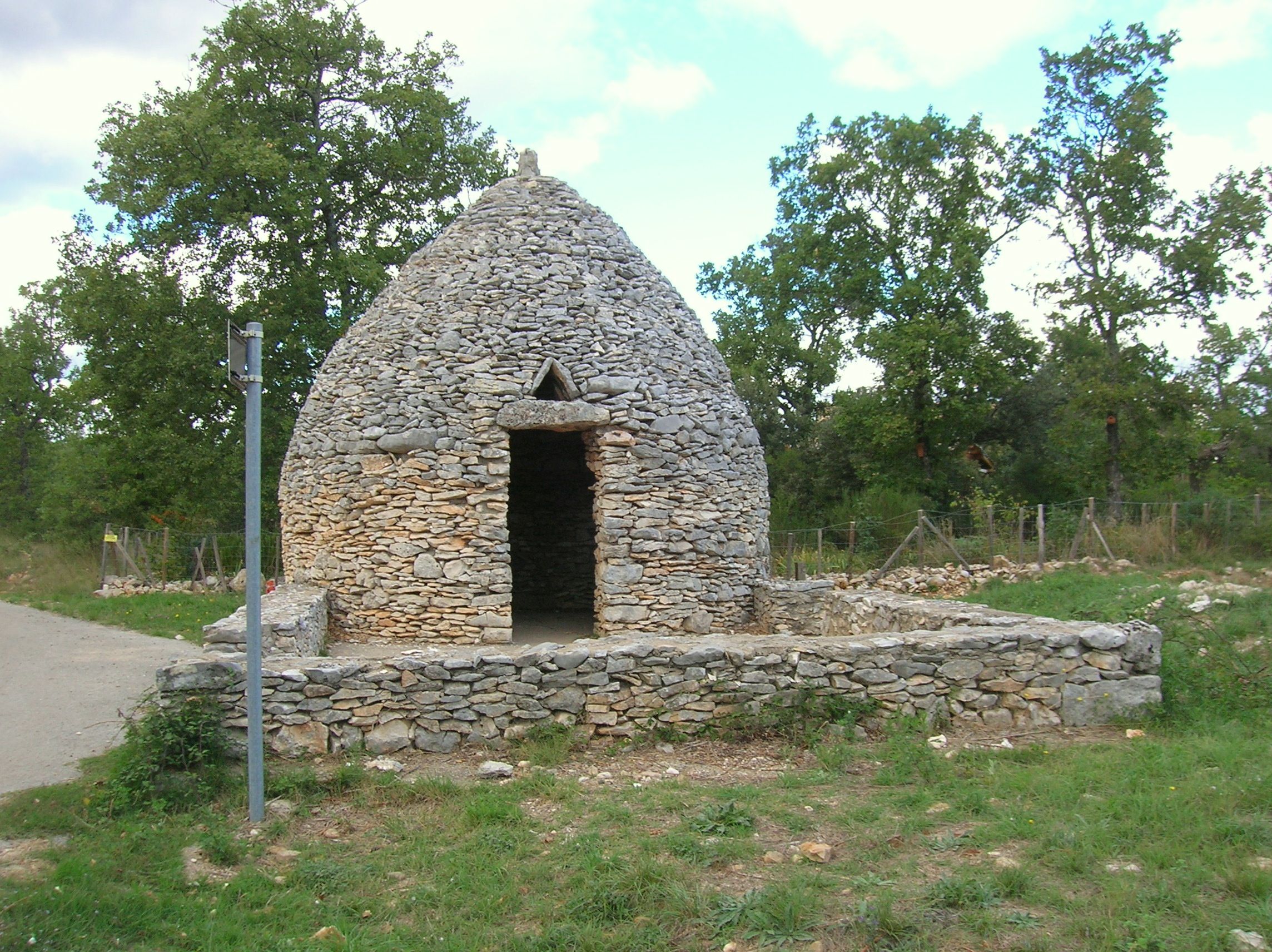 Méjannes-le-Clap, Gard, Languedoc-Roussillon-Midi-Pyrénées, France.